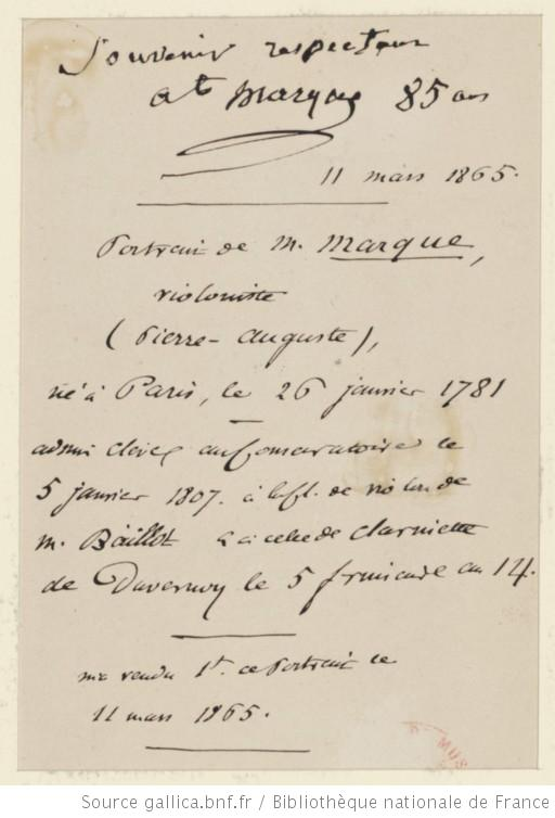 Verso du portrait de Pierre Auguste Marque, (1781-1868) daté de 1865. Document en couleur